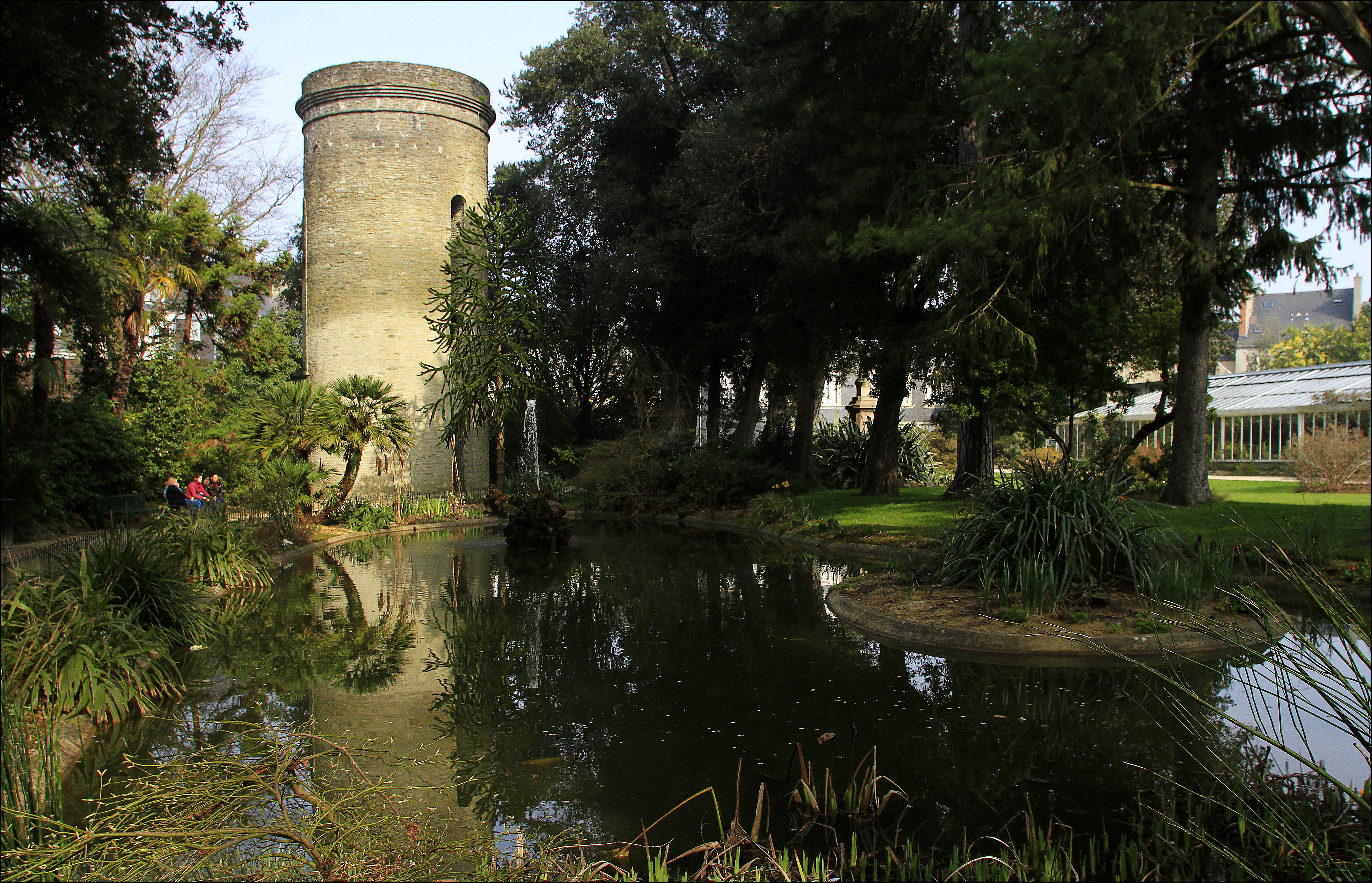 Domaine Emmanuel-Liais